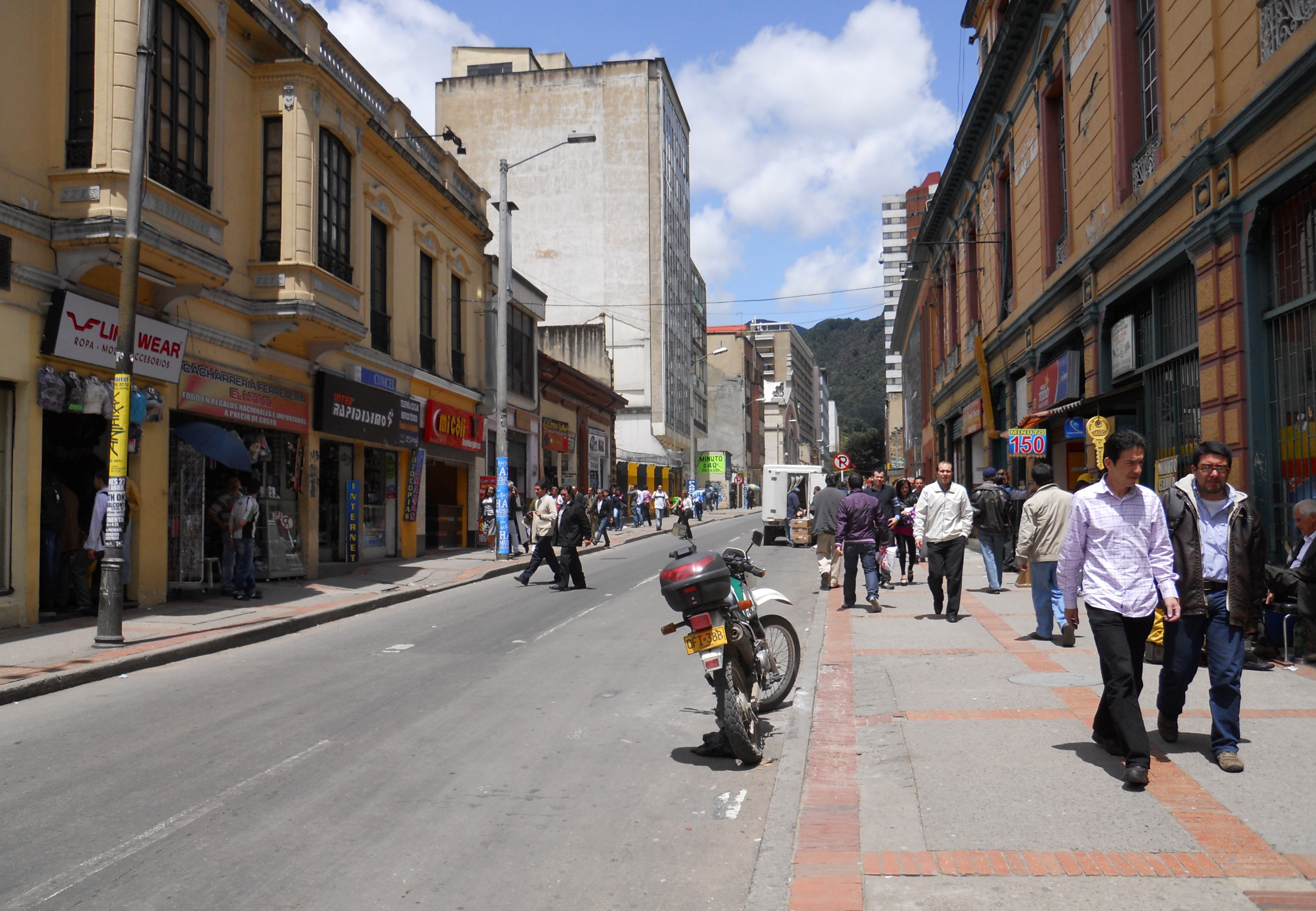 Calle 22, cerca de la carrera 7, Las Nieves. Centro de Bogotá.